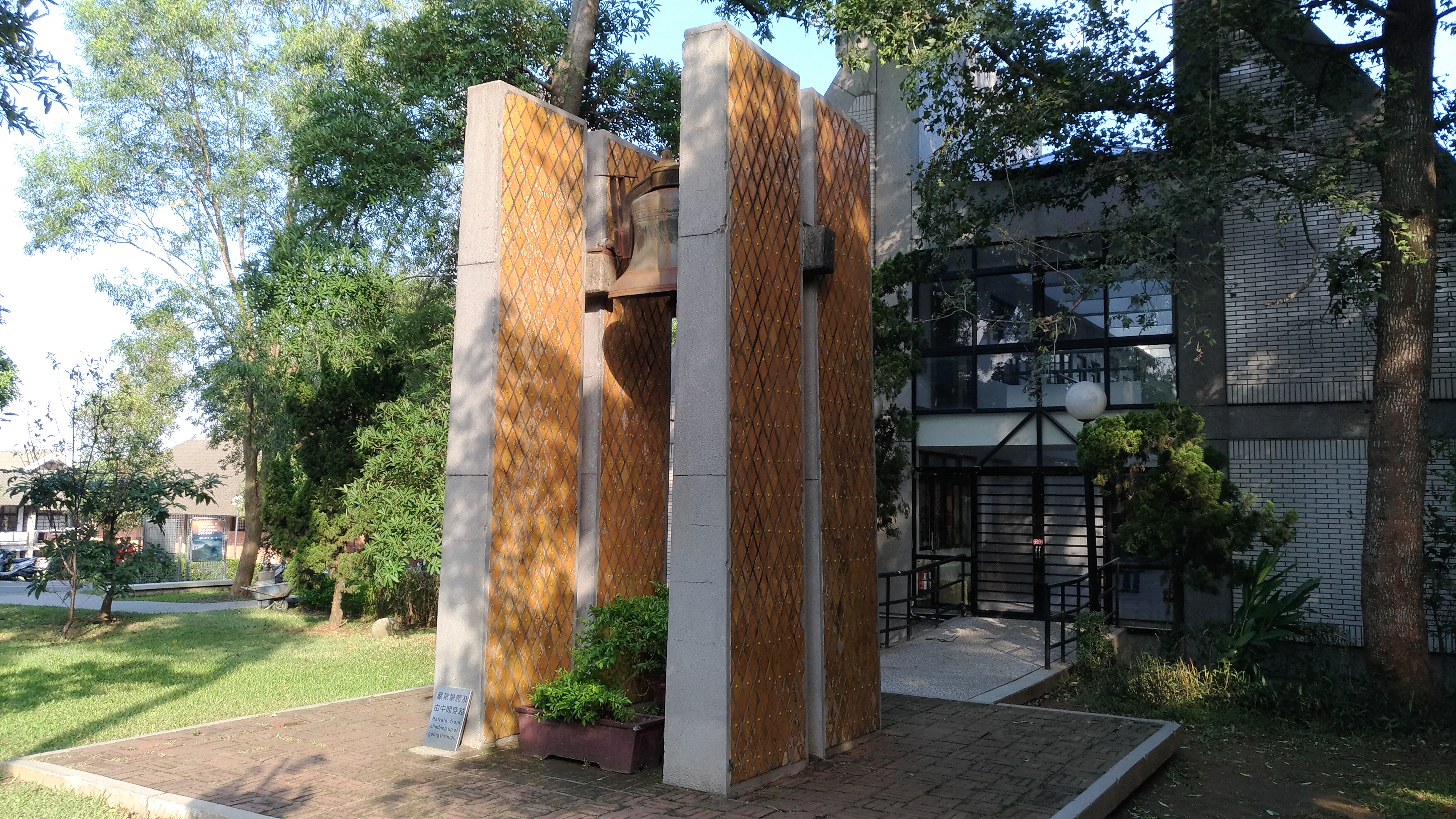 中文（台灣）: 畢律斯鐘樓